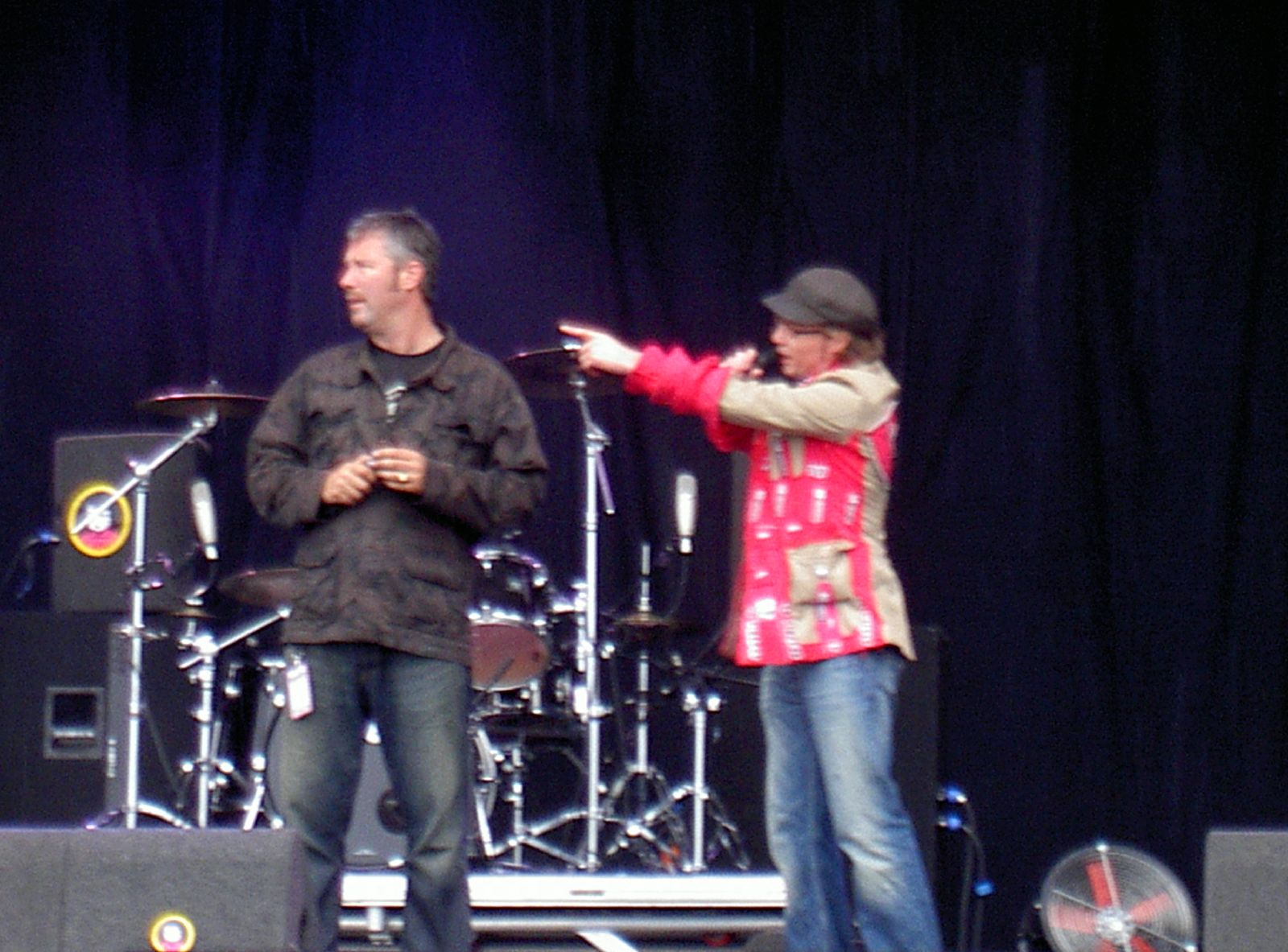 Pinkpop 2007 3FM jocks